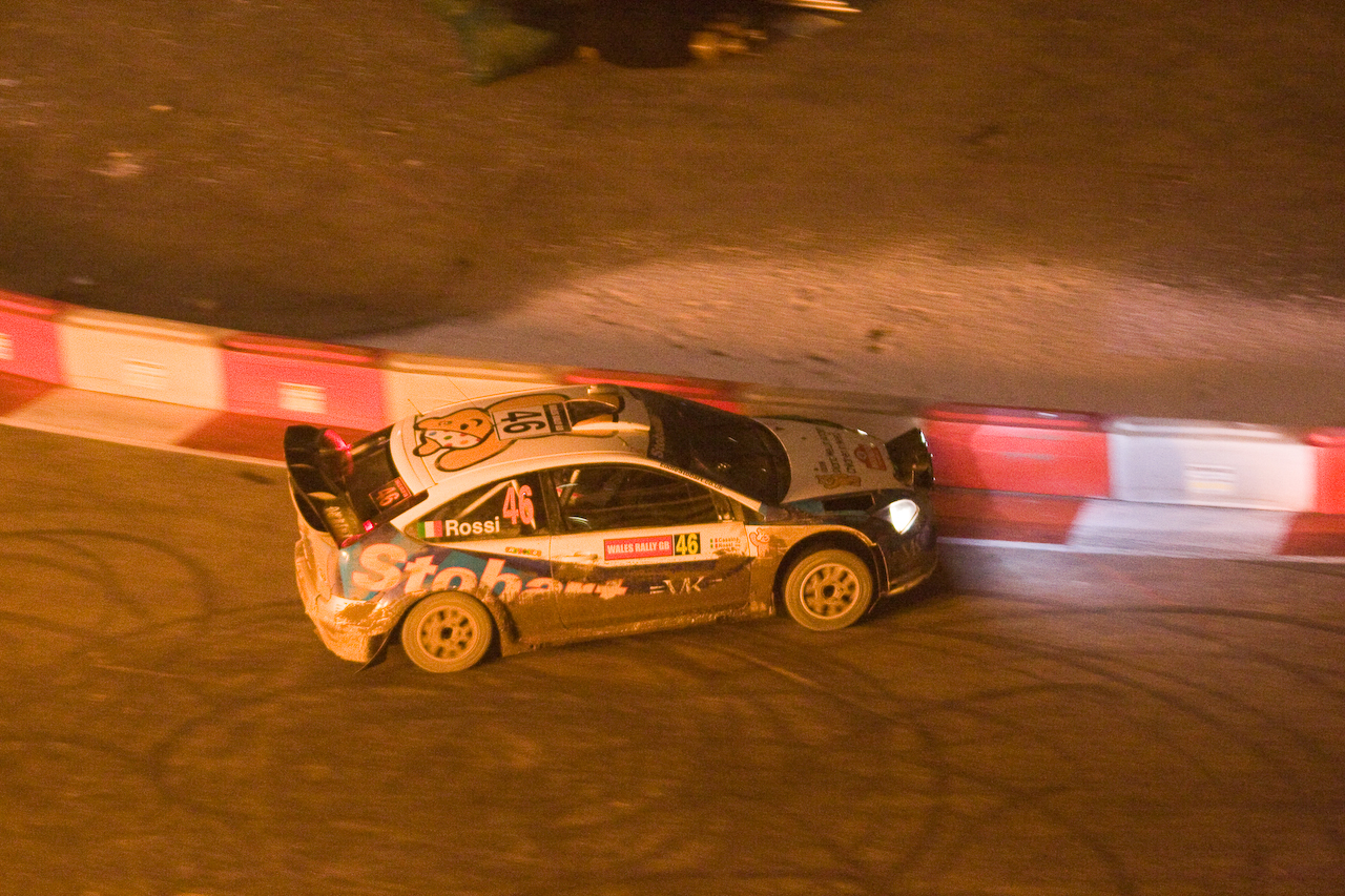 Valentino Rossi in a WRC Ford Focus